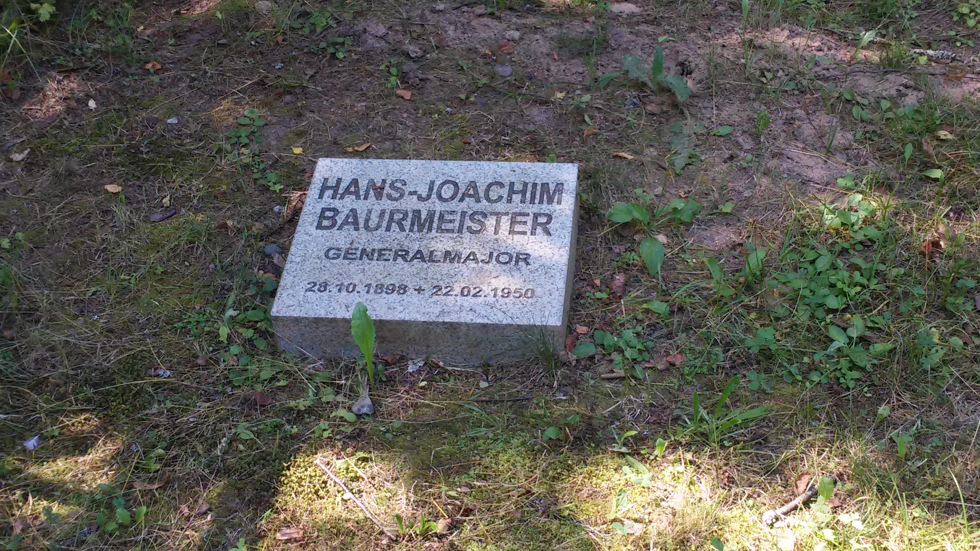 Tombstone; Cherntsy Memorial